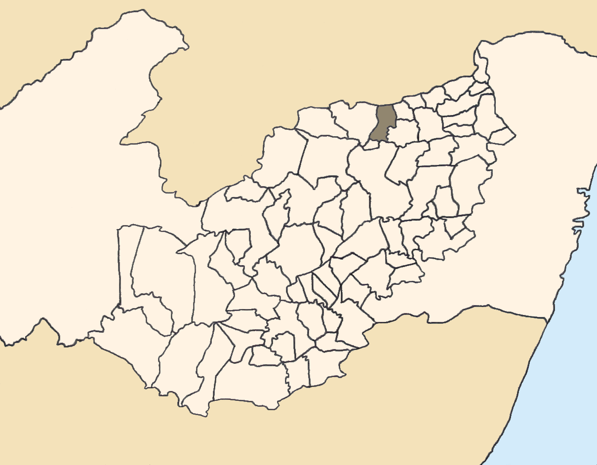 Mapa da mesorregião Agreste de Pernambuco (Brasil) subdivida em municípios. Em destaque, o município de Vertentes. Map of the brazilian state of Pernambuco (mesorregião Agreste) showing the city of Vertentes. Imagem tratada com o GIMP. Image made with GIMP.